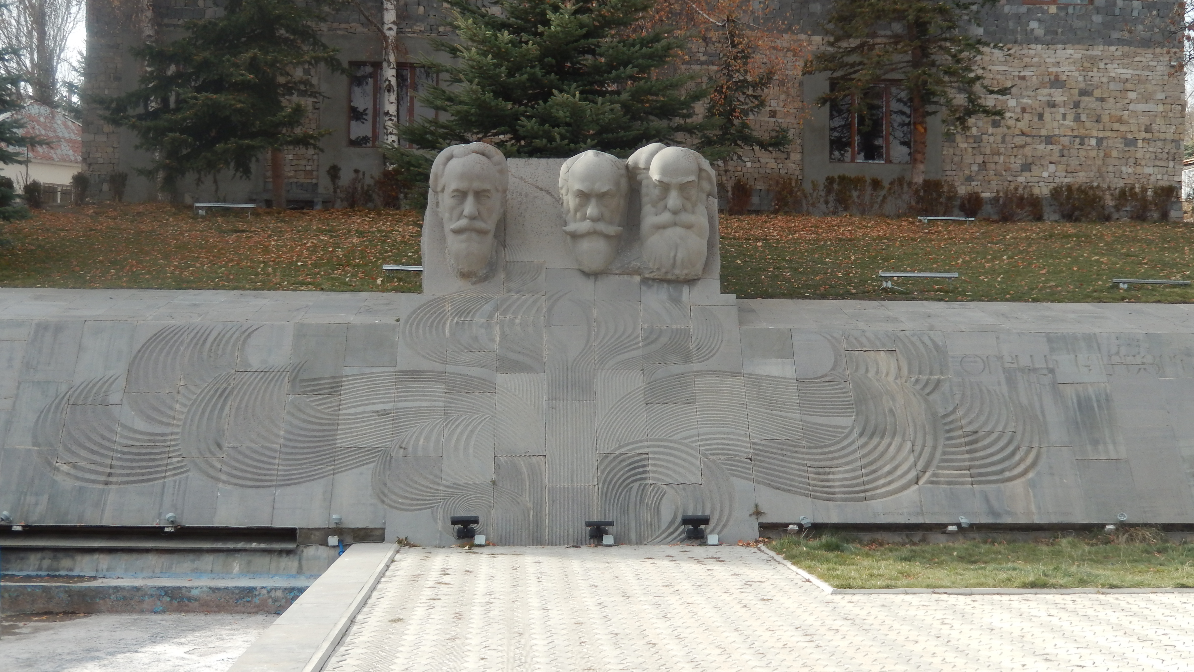 Հուշարձան Լևոն, Հովսեփ և Ռուբեն Օրբելի եղբայրներին 5/4.1